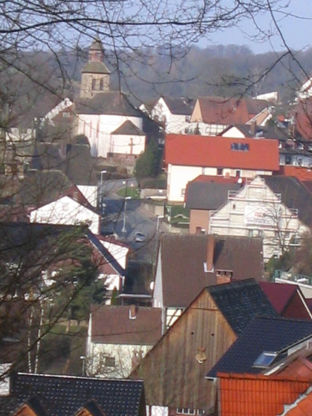 Blick über Bödexen